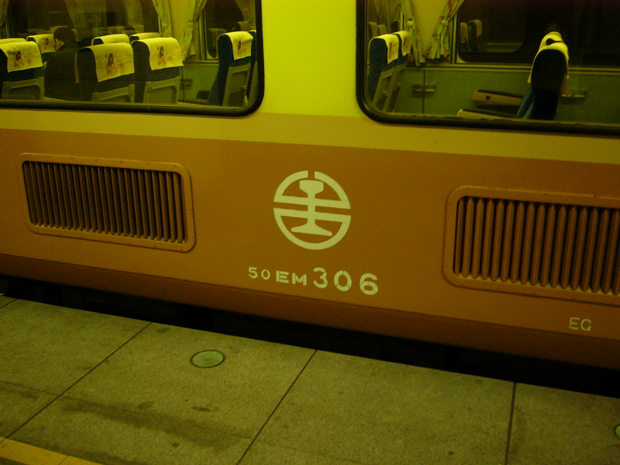 台鐵EMU300型電聯車的編號格式，本照片中車輛為駕駛馬達車50EM306。